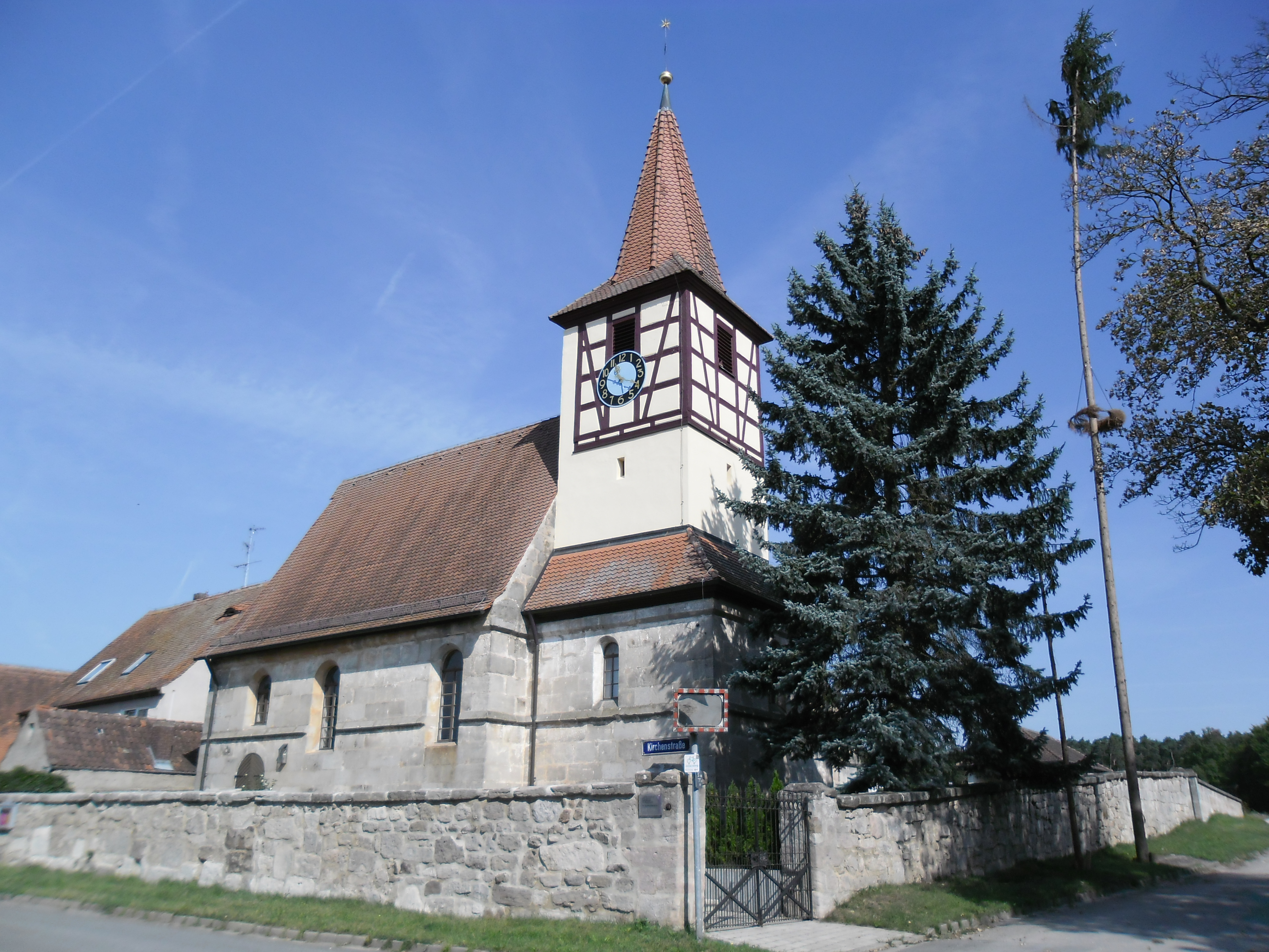 Die evangelische Filialkirche St. Bartholomäus stammt aus dem 15. Jahrhundert, auf einem Sandsteinbau thront ein Fachwerkchortürmchen.